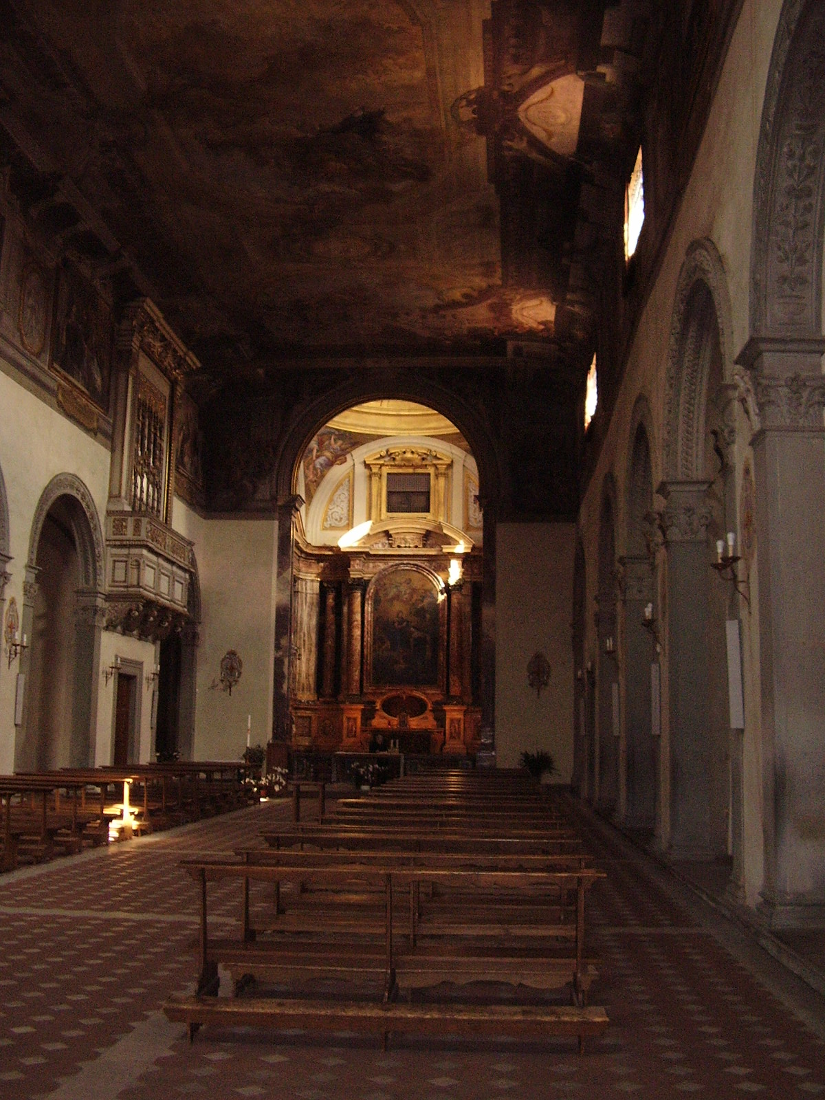 Santa Maria Maddalena de' Pazzi, inside view, church in Florence, Italy Firenze